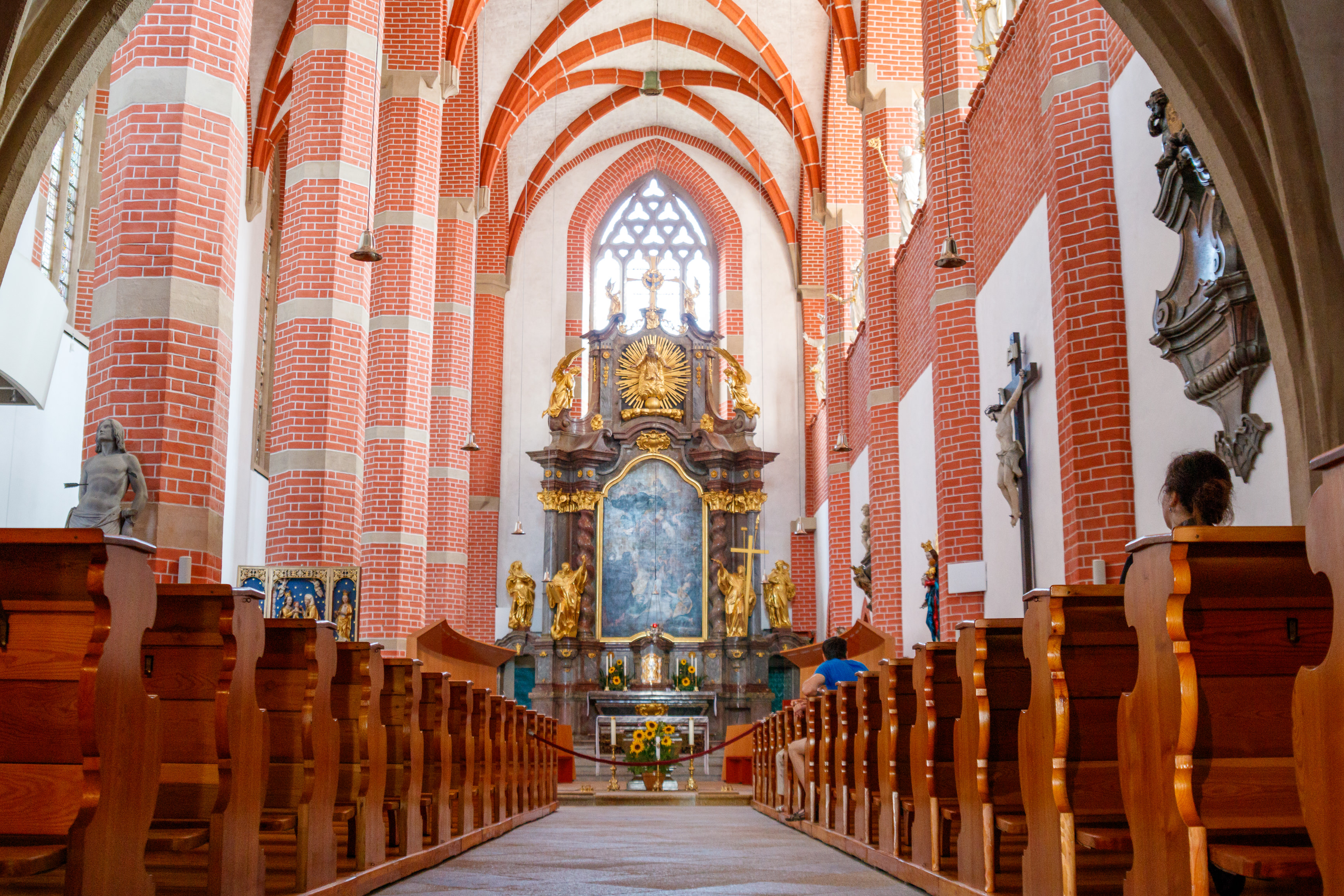 Das Kloster Sankt Marienstern (obersorbisch Klóšter Marijina Hwězda) ist eine Zisterzienserinnen-Abtei und liegt am Klosterwasser in Panschwitz-Kuckau in der sächsischen Oberlausitz.